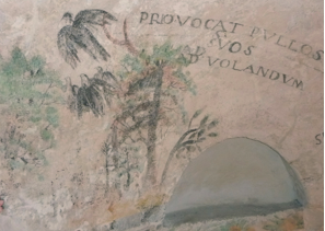 Détail, peinture murale XVIIème, coupole église. Sainte-Marie Cantal.